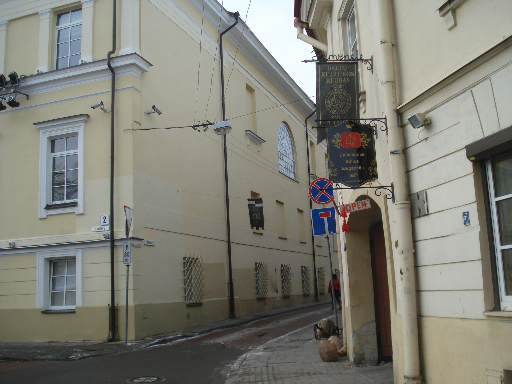 Угол улиц Швянто Миколо и А. Волано. Вильнюс (Литва)